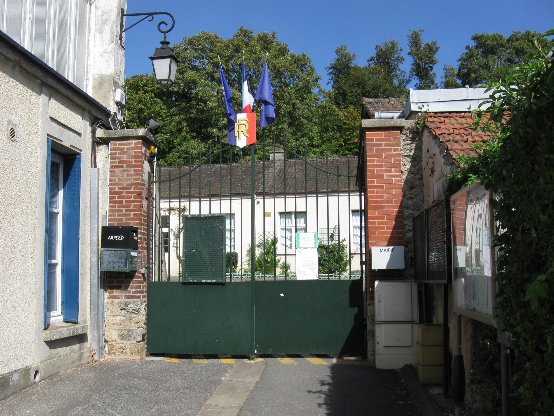 Mairie de Trilbardou. (Seine-et-Marne, région Île-de-France).